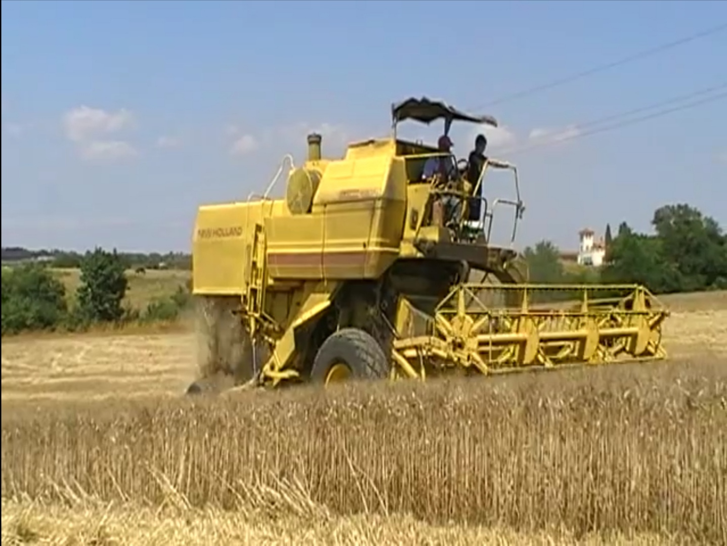 Mietitrebbiatrice